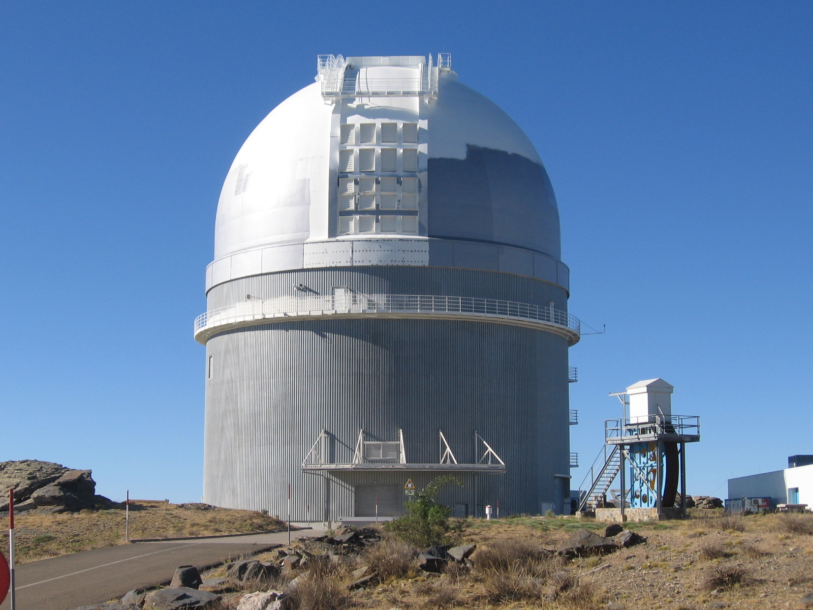 Observatorio astronómico en Calar Alto, Bacares, España.